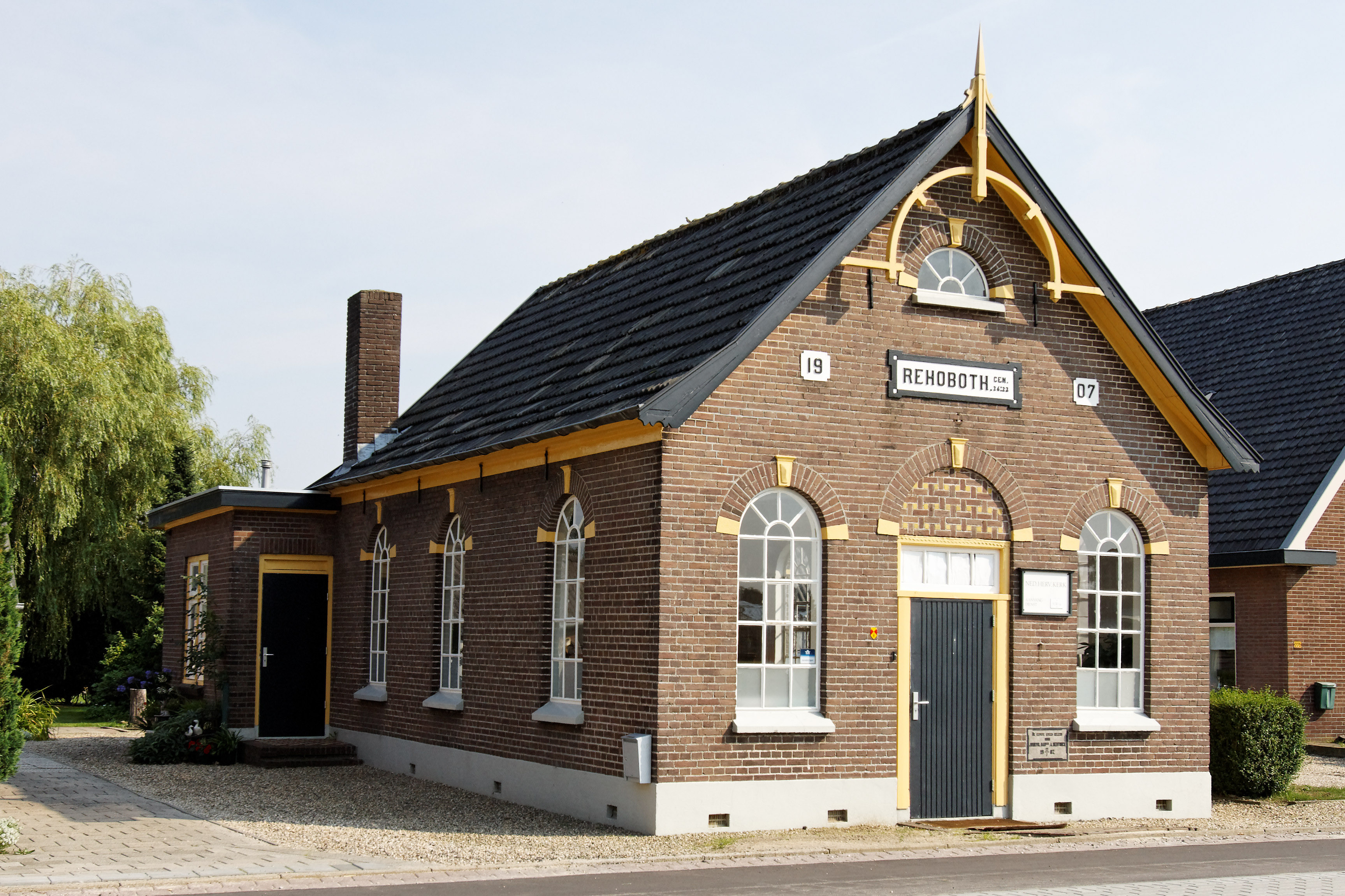 100814-165518_ 4525_50D